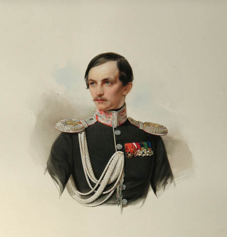 Viktor Illarionovich Vasilchikov (1820-1878)